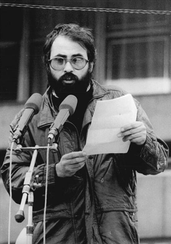 ADN-ZB Link 4.11.89 Berlin: Demonstration 500.000 Bürger beteiligten sich an einer Demonstration für den Inhalt der Artikel 27 und 28 der Verfassung der DDR. Auf dem anschließenden Meeting auf dem Alexanderplatz ergriff auch der Dokumentarfilmer Joachim Tschirner das Wort.